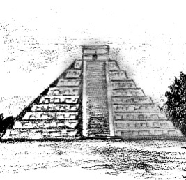 Բուրգ